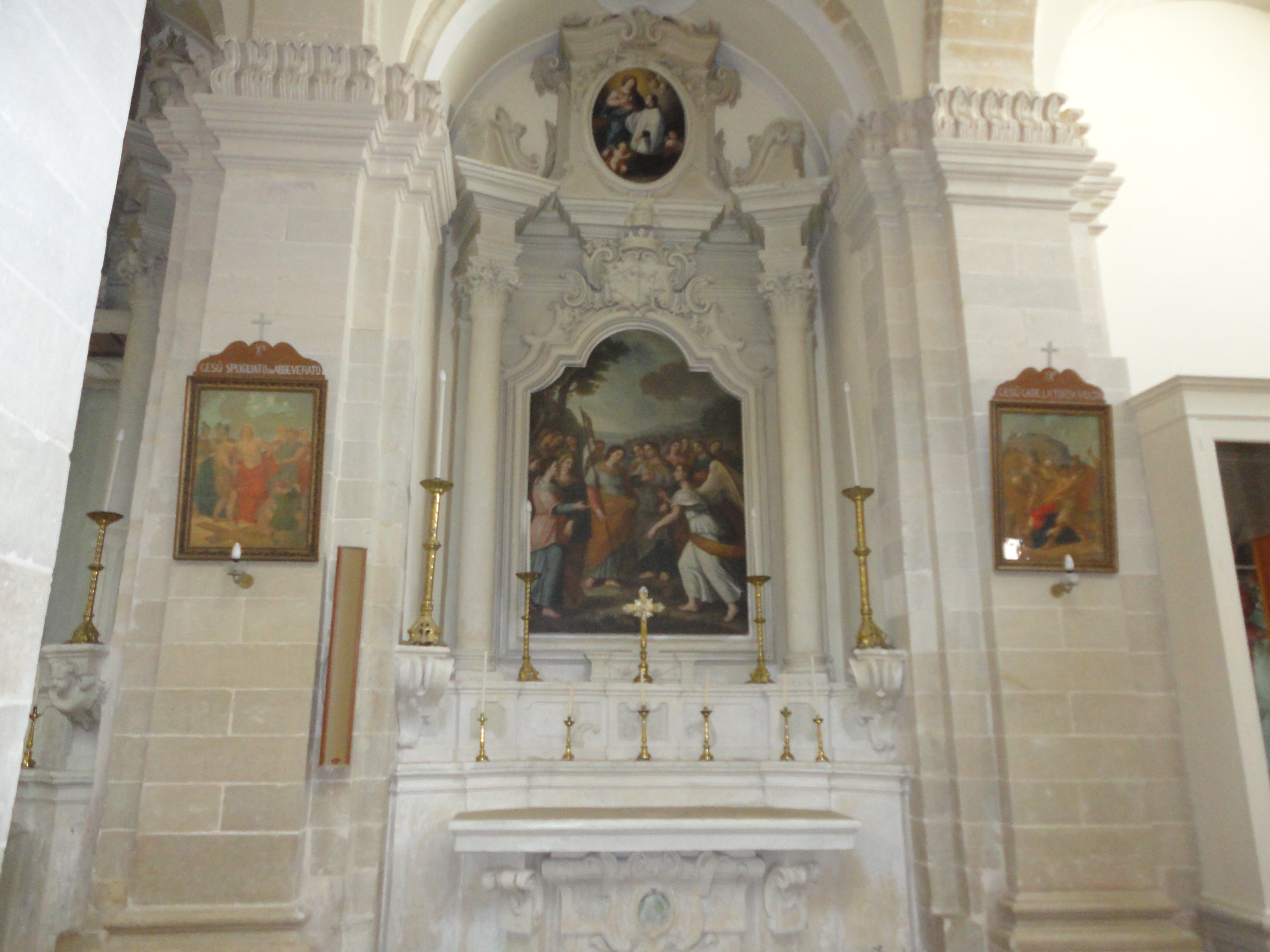 Chiesa di Uggiano la Chiesa Sant'Orsola, Lecce